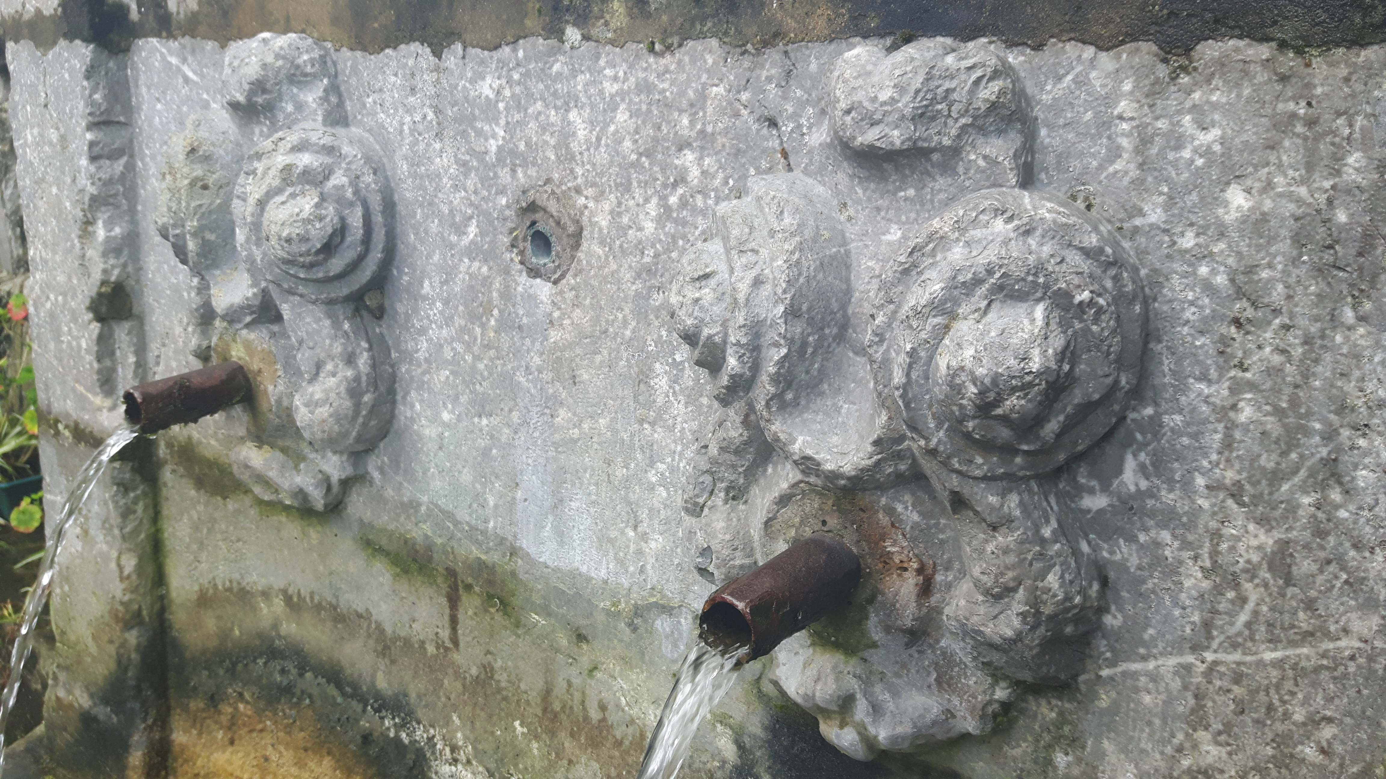 Caras de la fuente de la Fontana, Pravia, Asturias.